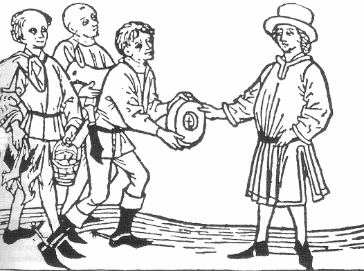 Zehntabgabe durch Bauern, zeitgenöss. Darstellung ca. 16., 17 Jht.